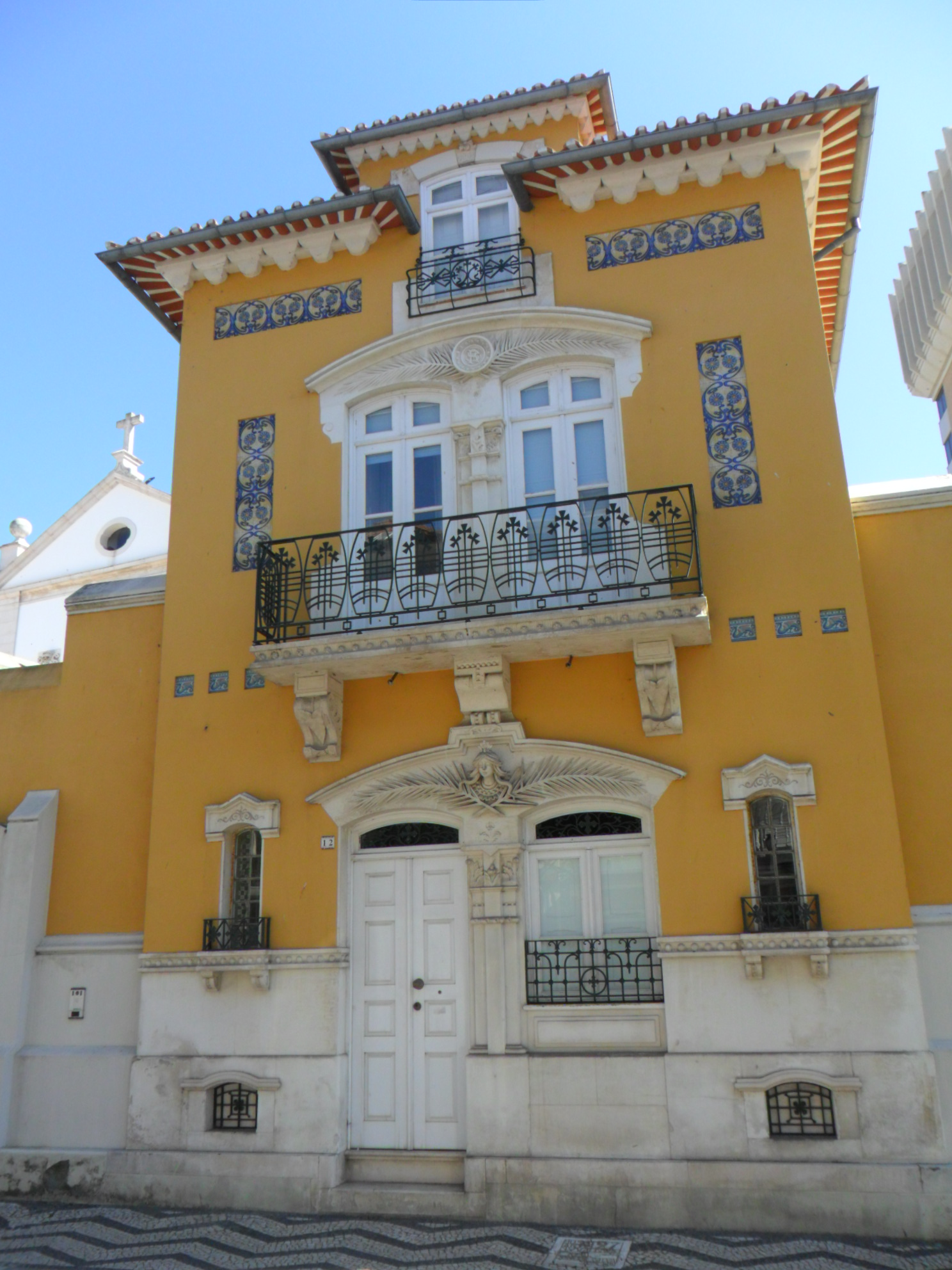 arte nova... This file was uploaded for Wiki Loves Monuments in Portugal with the unique identifier 155608.